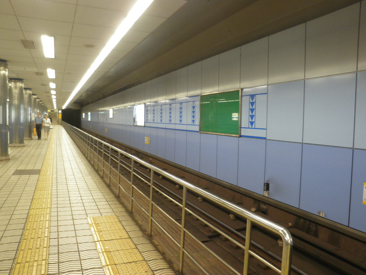 リニューアル後のホーム